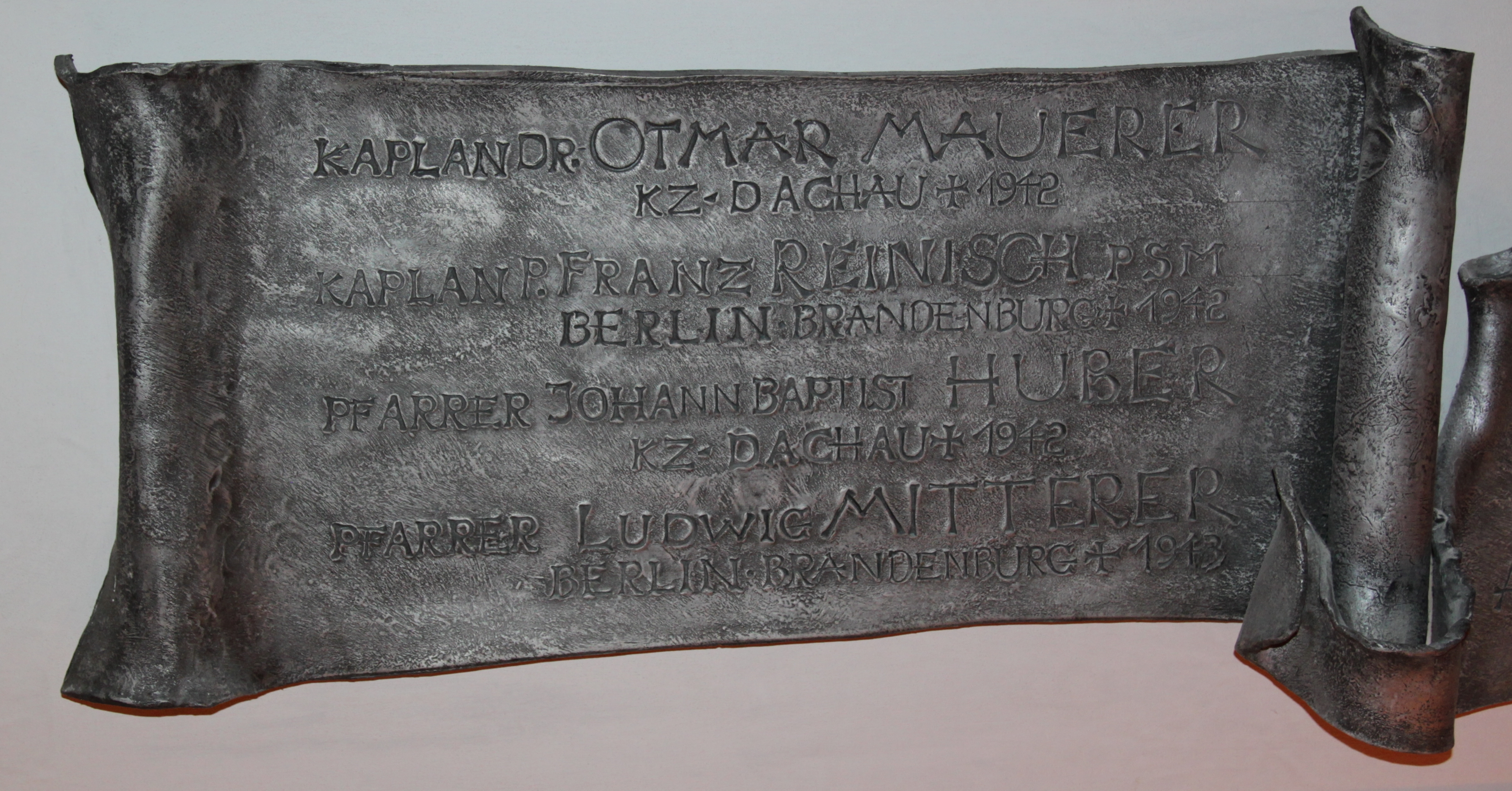 linker Flügel der Inschriften der Gedächtniskapelle Passauer Dom: Otmar Mauerer P. Franz Reinisch Johann Baptist Huber Ludwig Mitterer